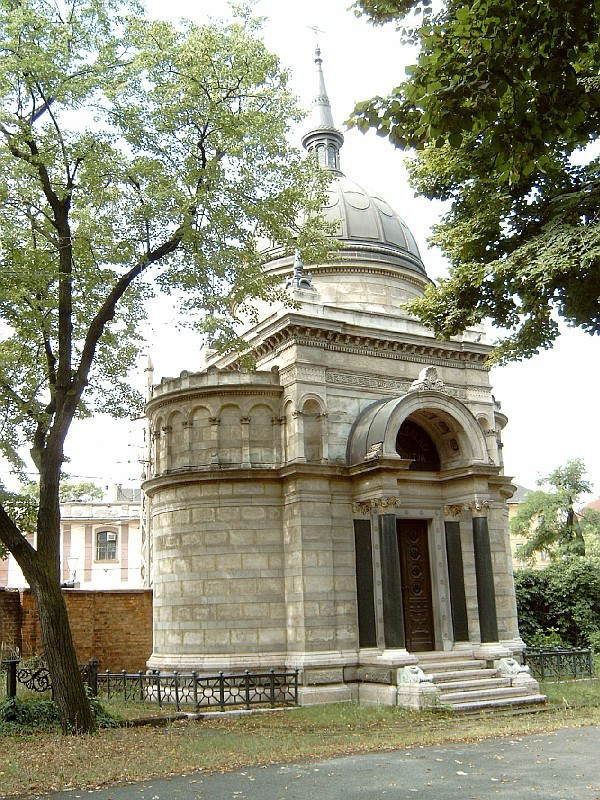 Ganz Ábrahám sírja Budapesten. Ybl Miklós tervei (1869) alapján építette Hofhauser Lajos és Hubert József. Kerepesi temető: J. 191-193.